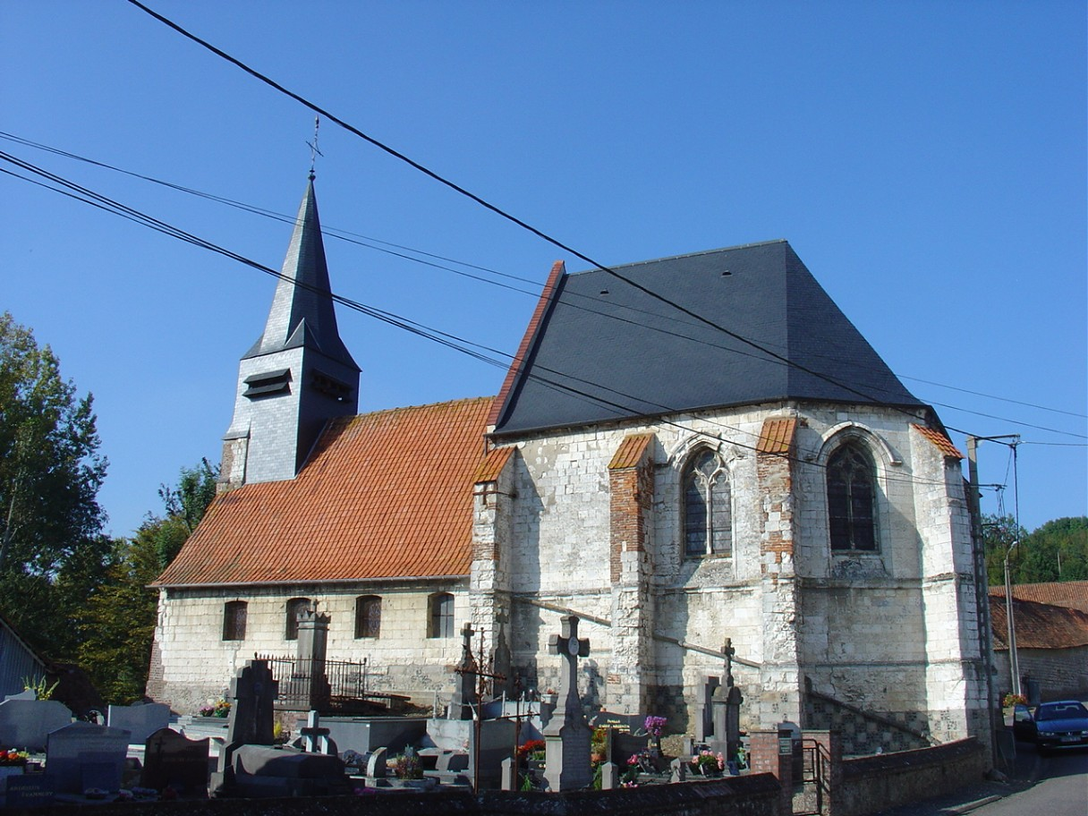 Église de Marles-sur-Canche